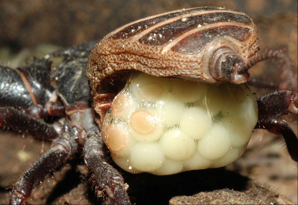 Mastigoproctus giganteus, Uropygi, femelle avec son sac d'oeufs.